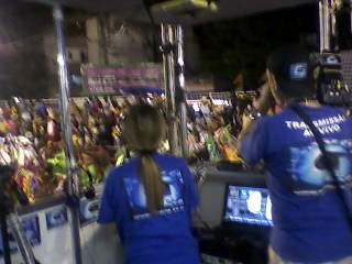 Repórteres da TVG Rio no Carnaval da Intendente Magalhães - 2014